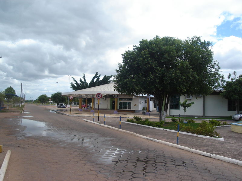 UFRR